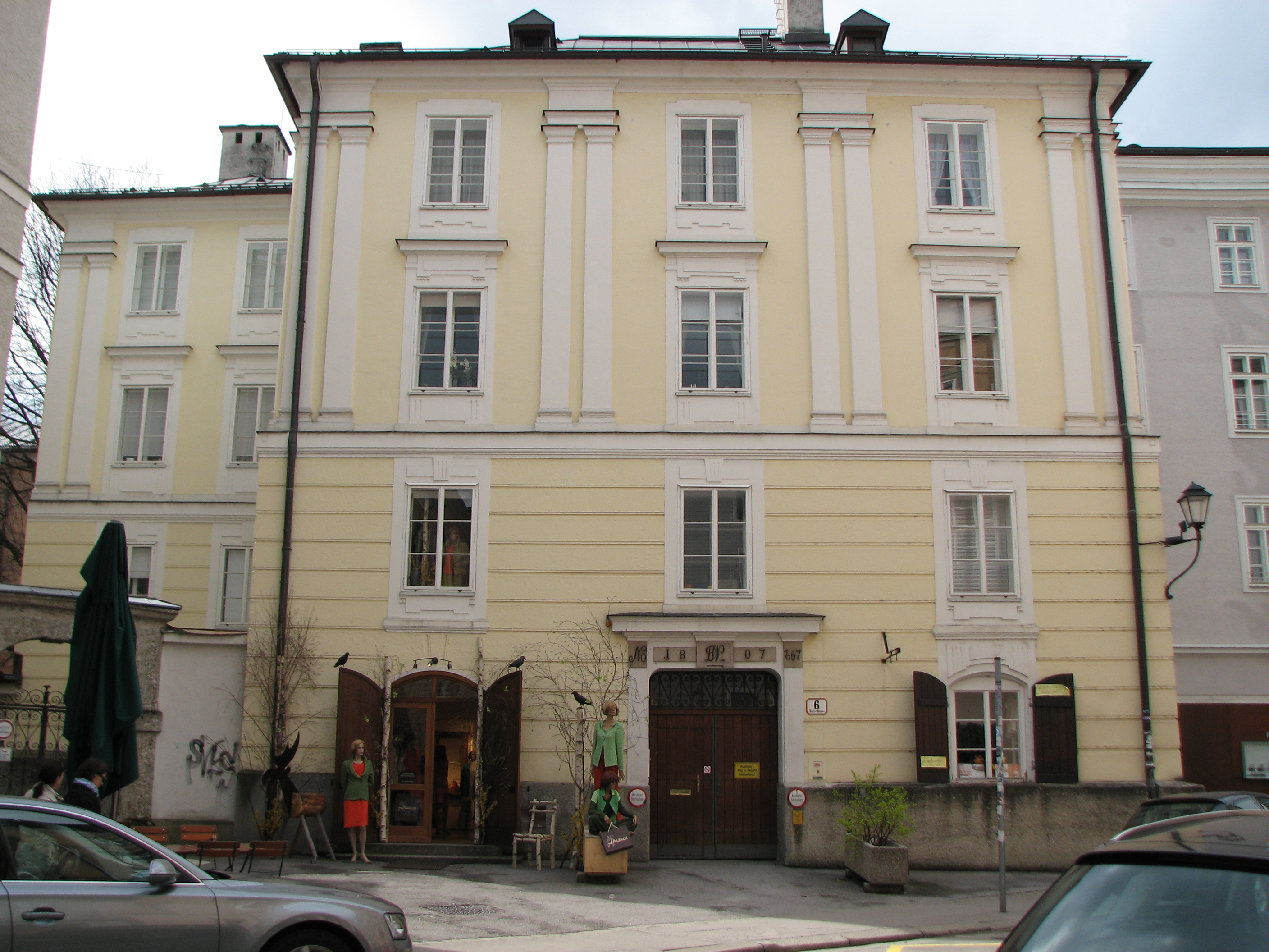 Bürgerhaus, das sog. Rothe Bruderschafts-Meßnerhaus